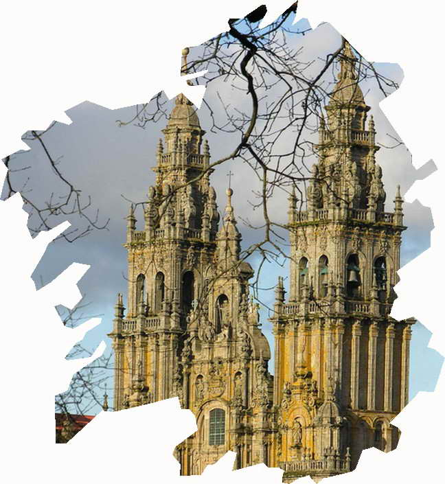 self made